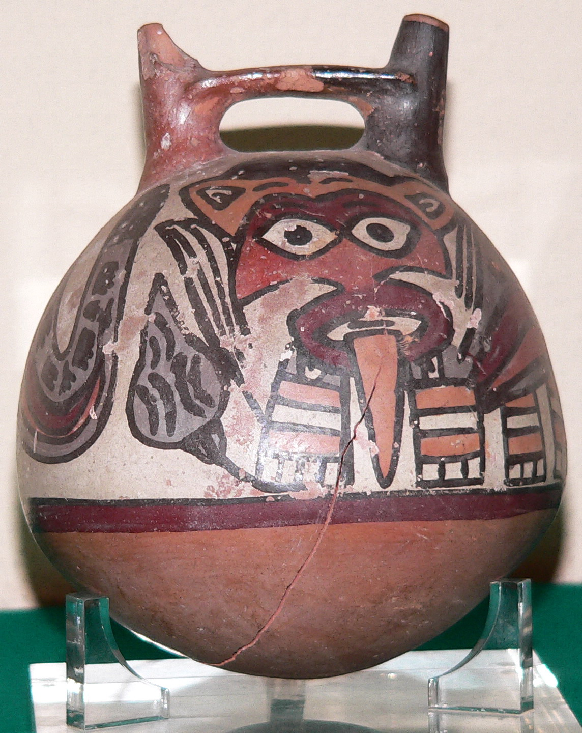 Descripción: Huaco Nazca. Antigüedad: Siglo I a VI d.C Cultura: Cultura Nazca País : Perú Fotógrafo: © Manuel González Olaechea y Franco Fecha de la foto : 25 de abril de 2008